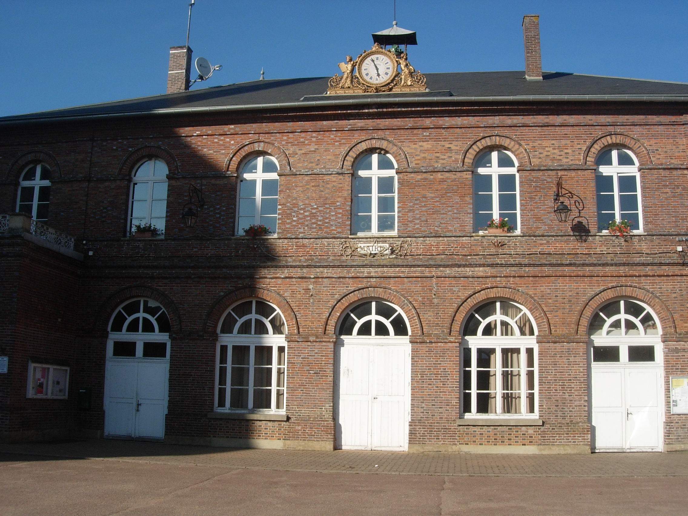 Mairie de Rigny-le-Ferron